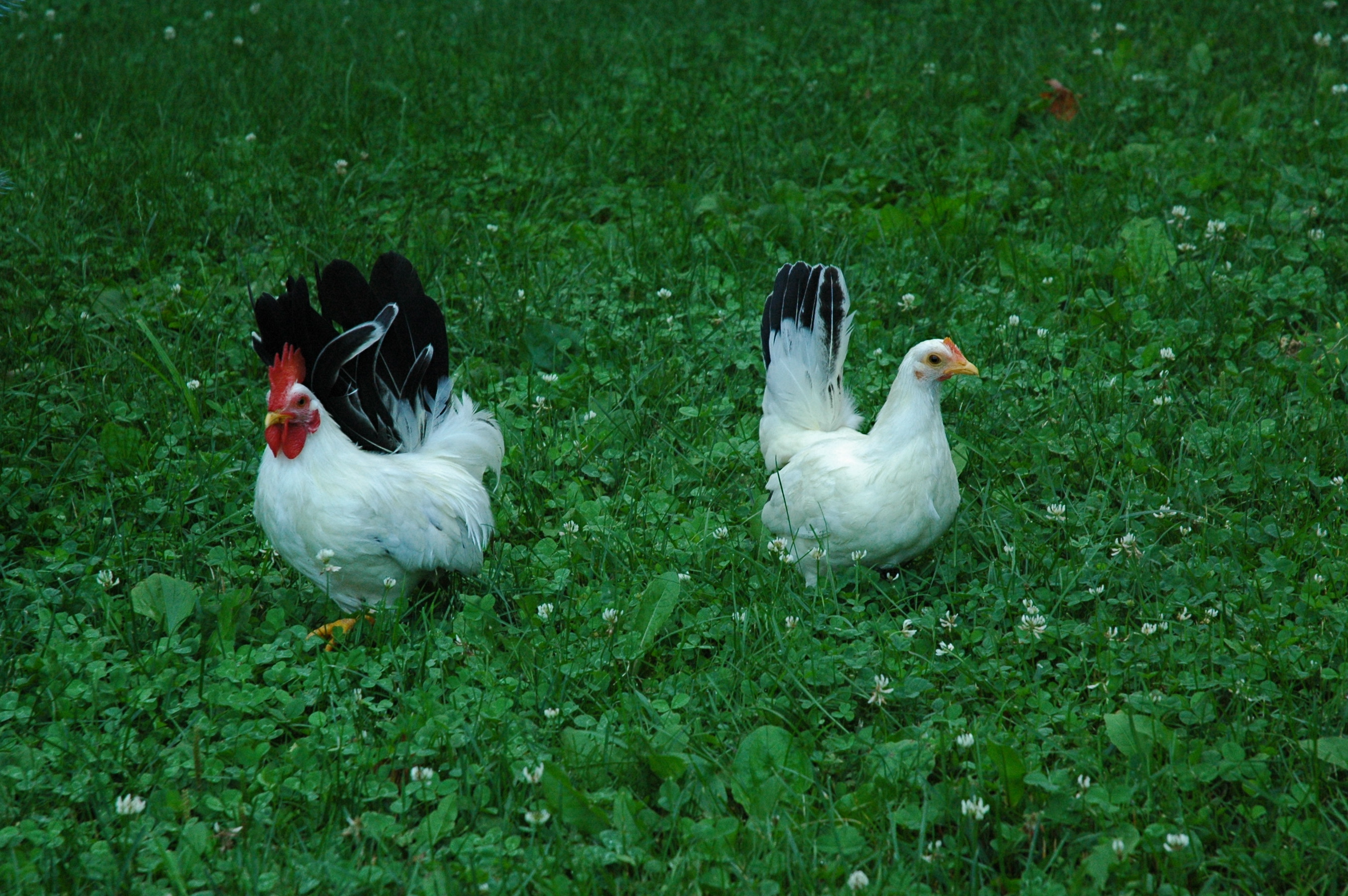 Japanese black-tail bantam pair